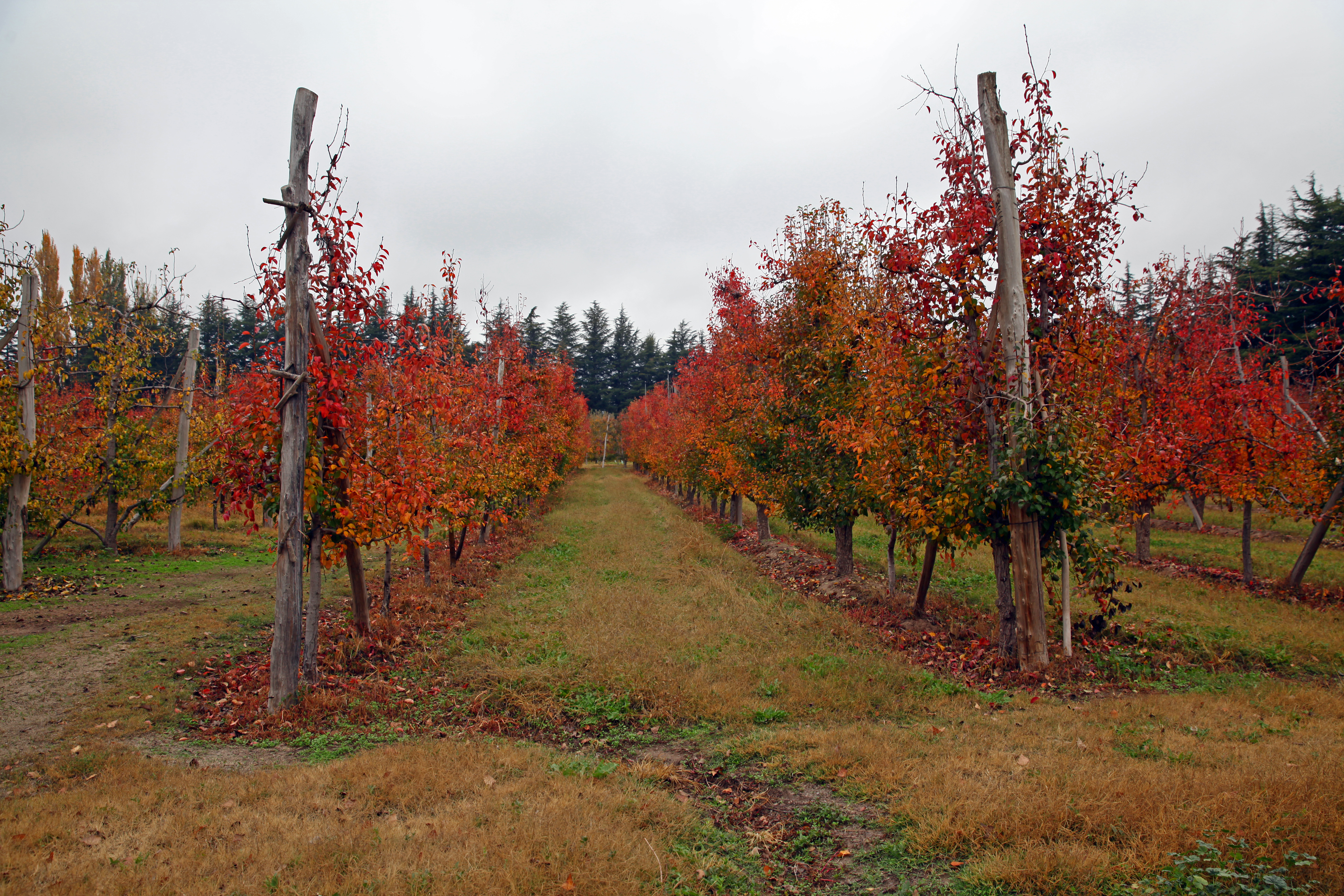 espaldera en otoño